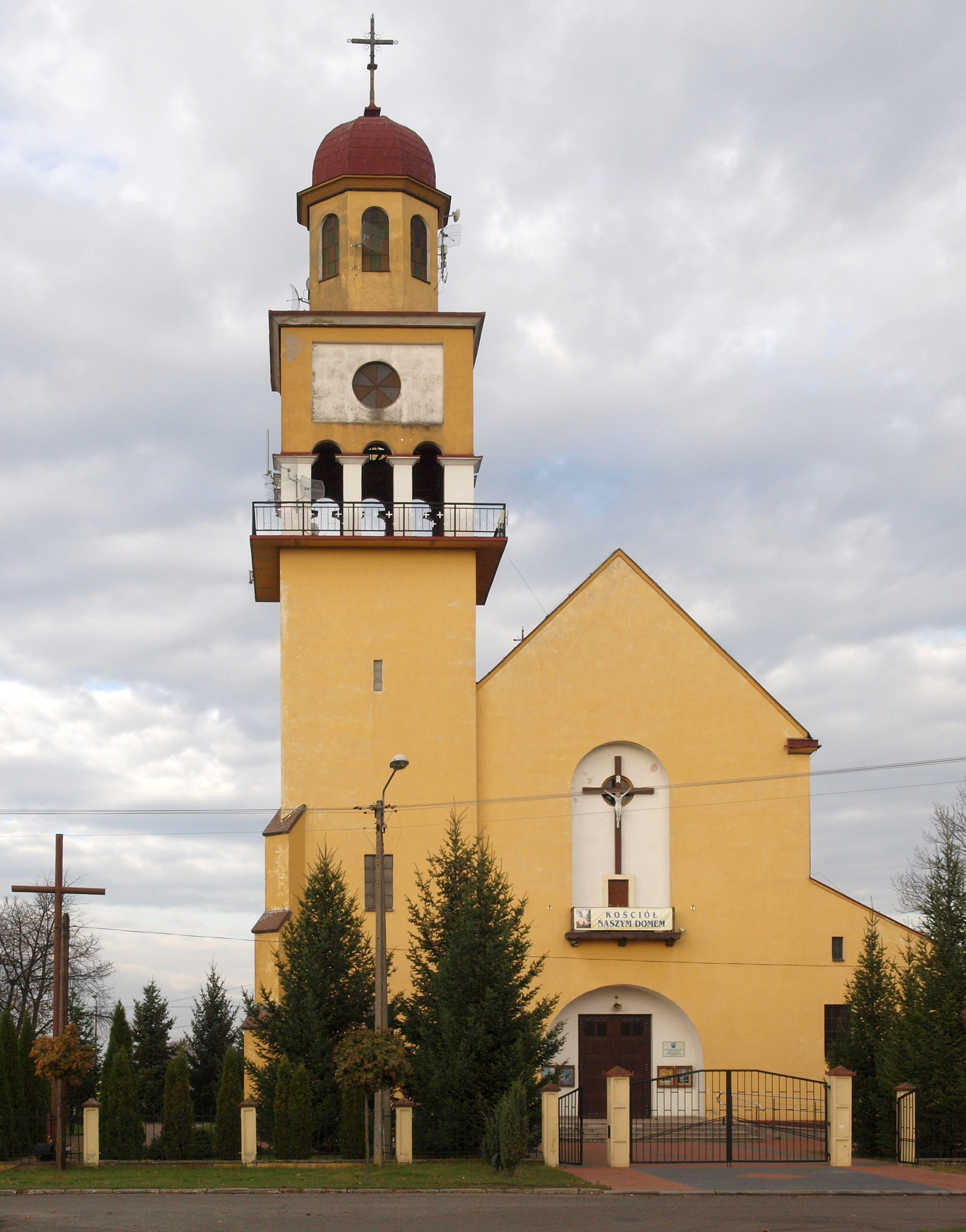 Chabielice - kościół ,elewacja południowa